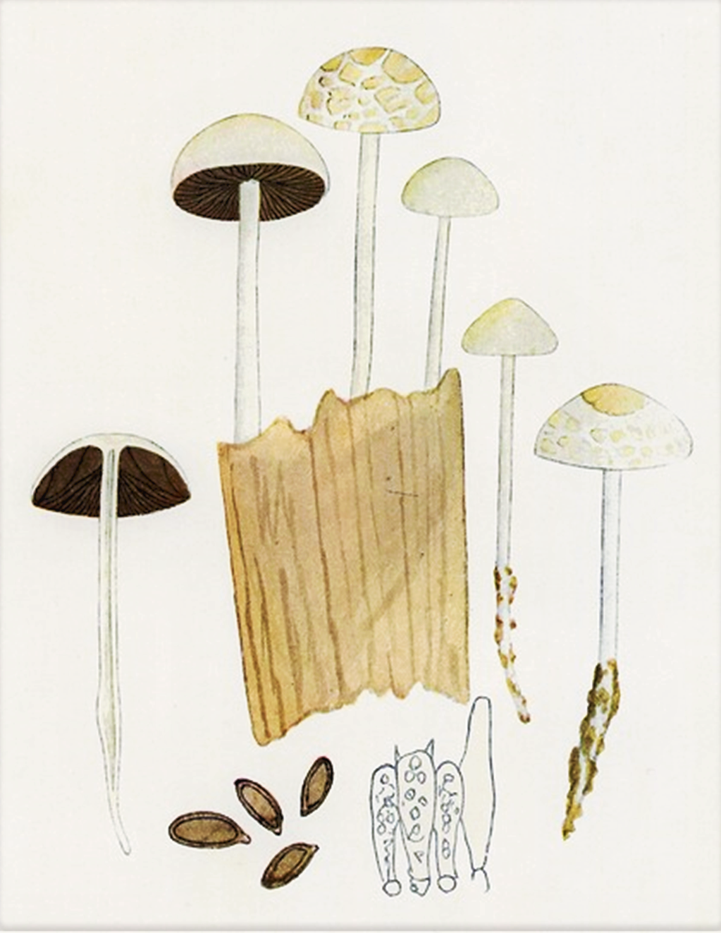 Giacomo Bresadola: Psilocybe cernua var. areolata (Klotzsch, 1836) Bres. (1931), heute Lacrymaria lacrymabunda (Bull., 1785) Pat. (1887)